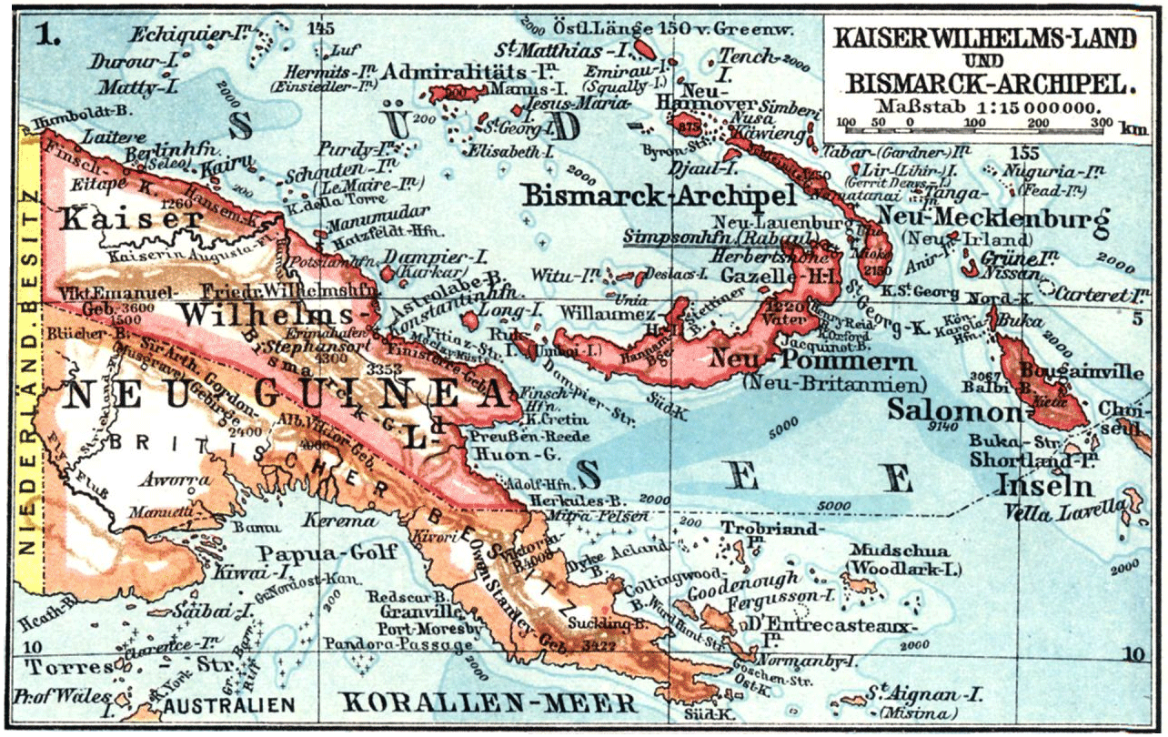 1. Kaiser Wilhelms-Land und Bismarck-Archipel. 2. Marshall-I.n 3. Karolinen und Marianen. 4. Kiau-Tschou-Gebiet. 5. Samoa-Inseln.